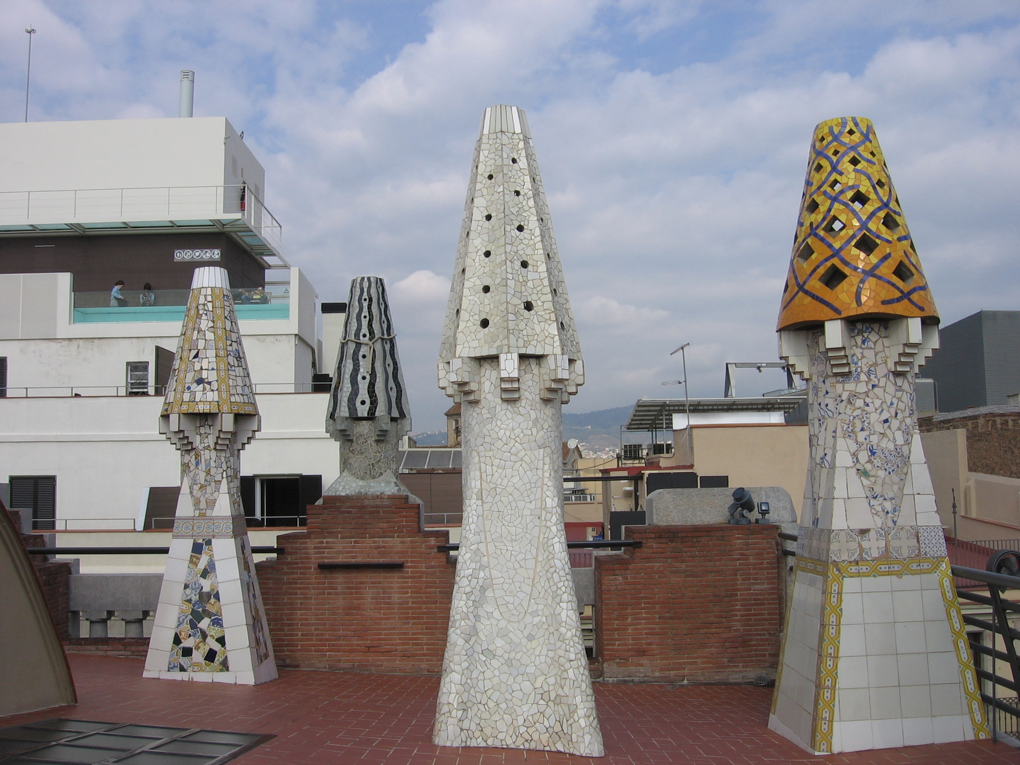 Chimeneas del Palacio Güell.